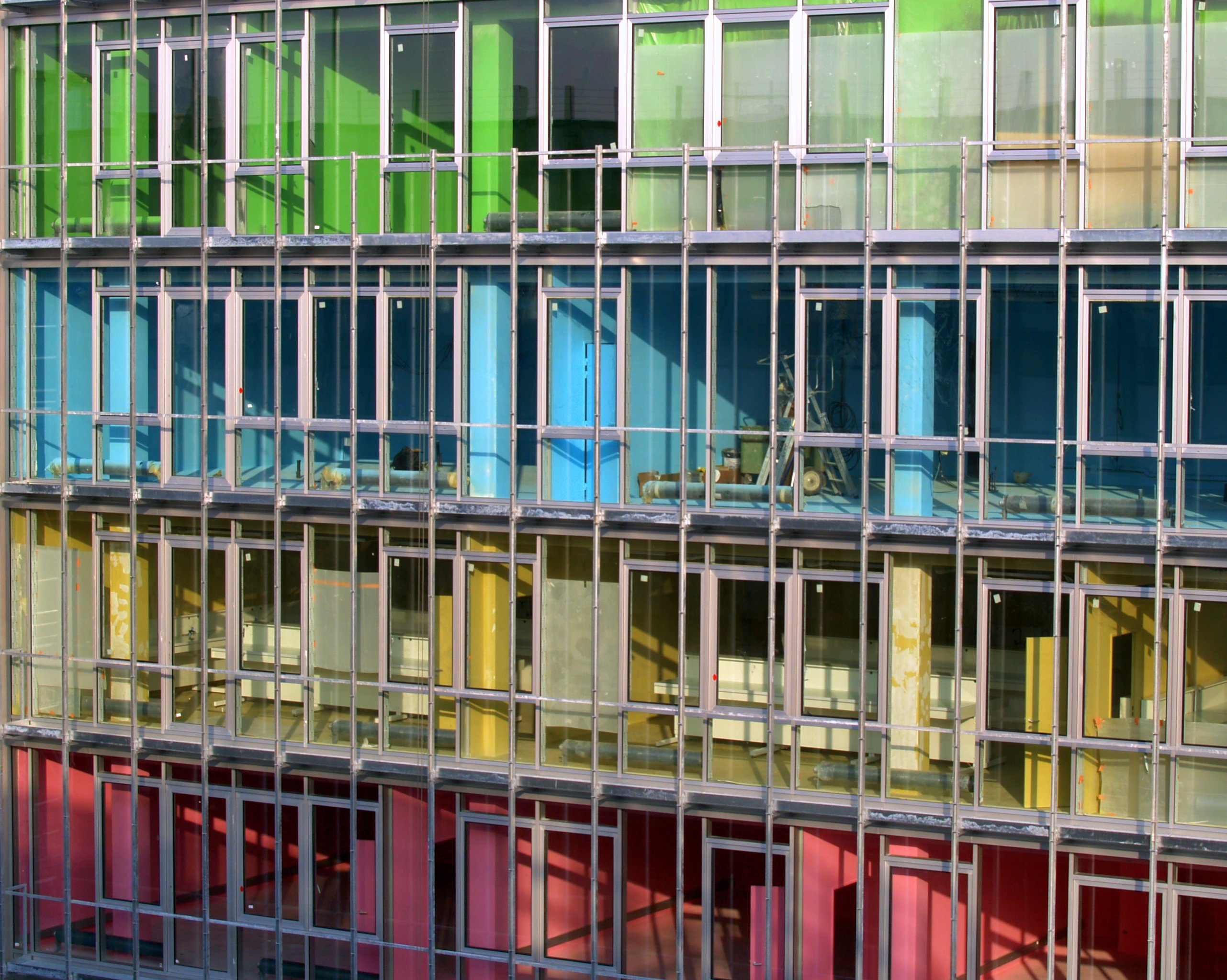 Université de Jussieu